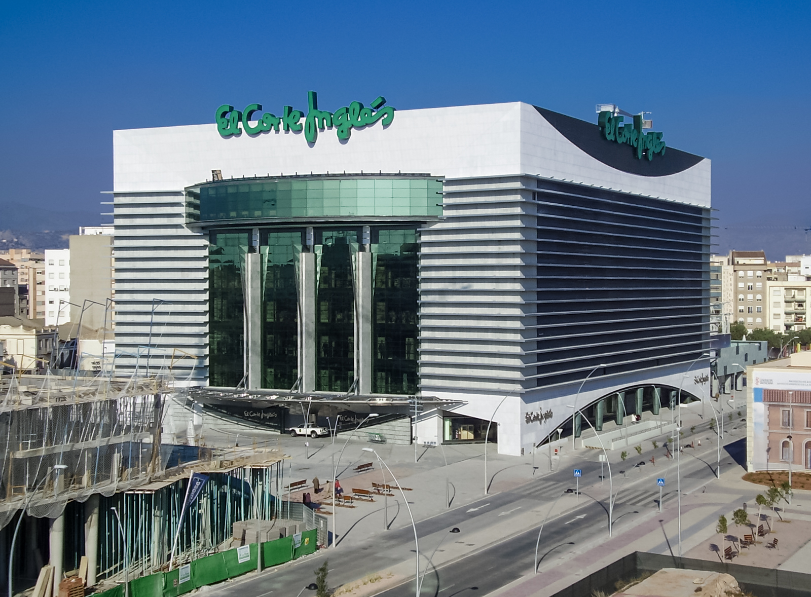 Foto del Corte Inglés de Castellón